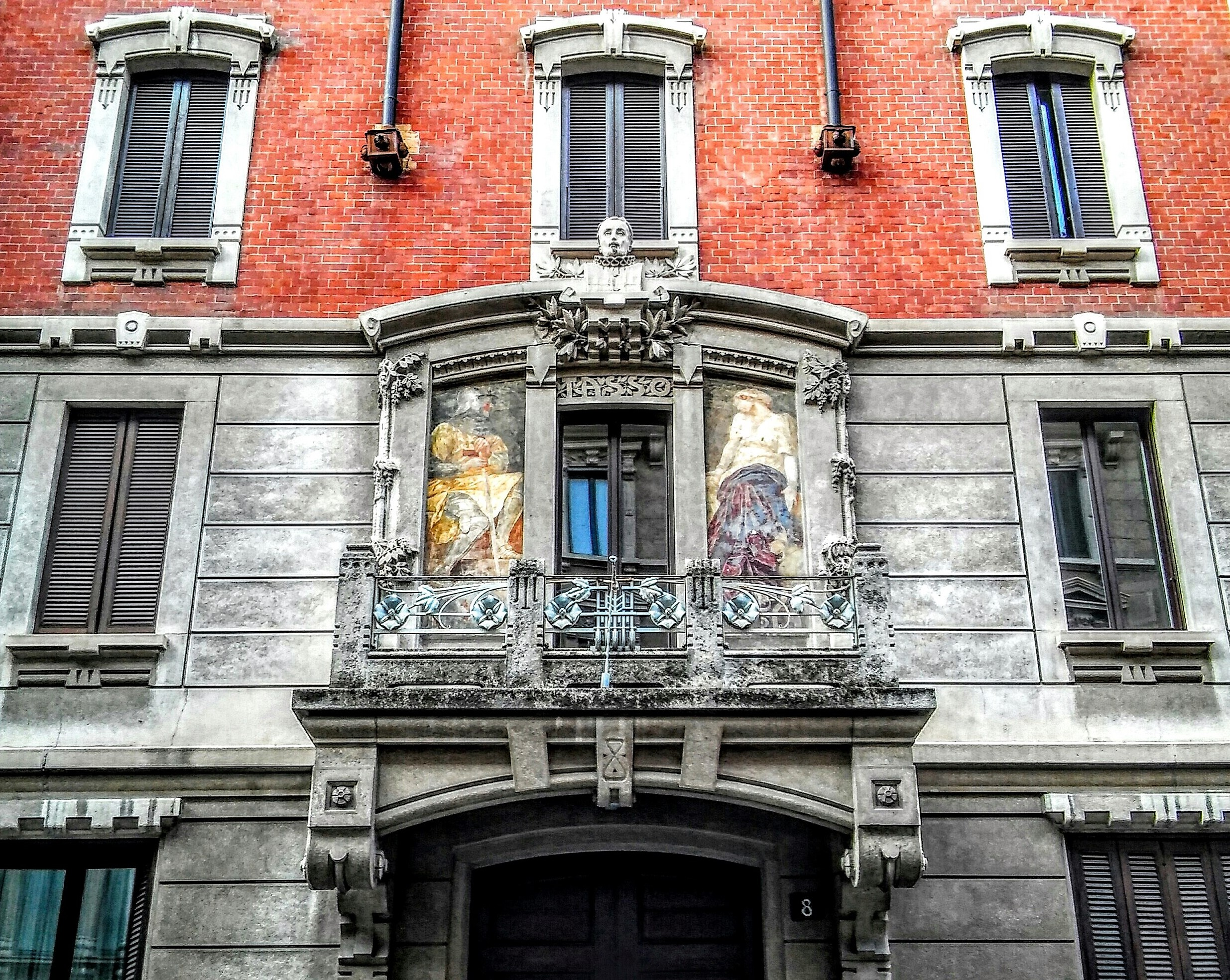 Milano, casa Donzelli in via Torquato Tasso 8, costruita dal 1912 al 1913 su progetto di E. Zanoni.Fonte: Maurizio Boriani, Corinna Morandi, Augusto Rossari, Milano contemporanea. Itinerari di architettura e di urbanistica, Maggioli Editore, 2007, p. 120. ISBN 978-88387-4147-6 Invalid ISBN.